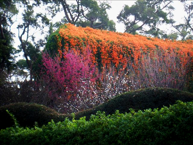 苗栗縣銅鑼鄉銅鑼公園之花季。